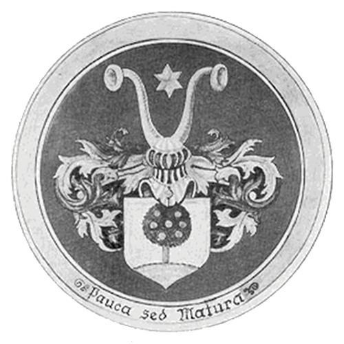 Siegel von Carl Friedrich Gauß pauca sed matura